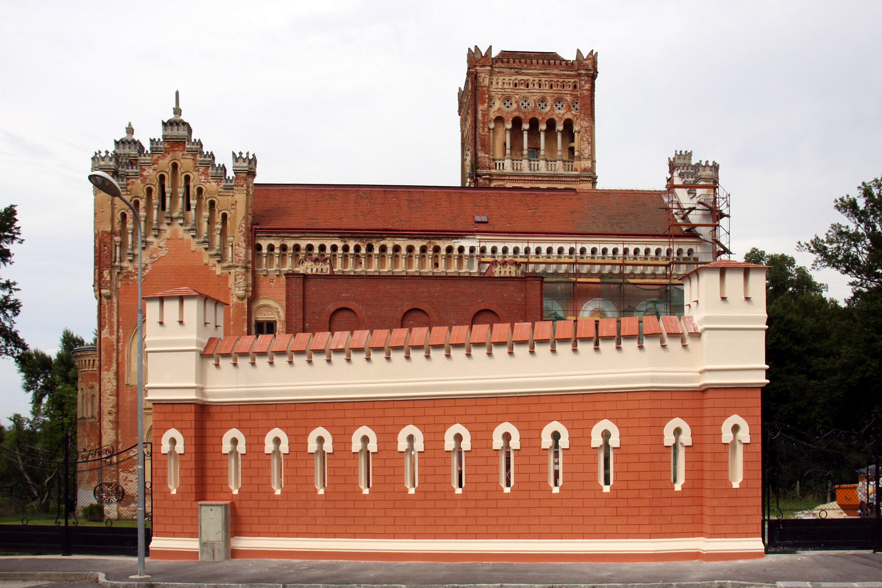 Denkmalgeschütztes Neues Schloss in Rotenturm an der Pinka Object location47° 15′ 01.76″ N, 16° 14′ 40.6″ E